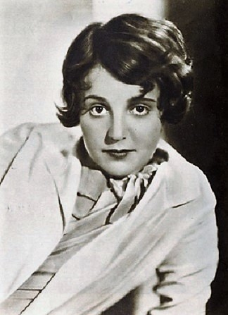 Sue Carol